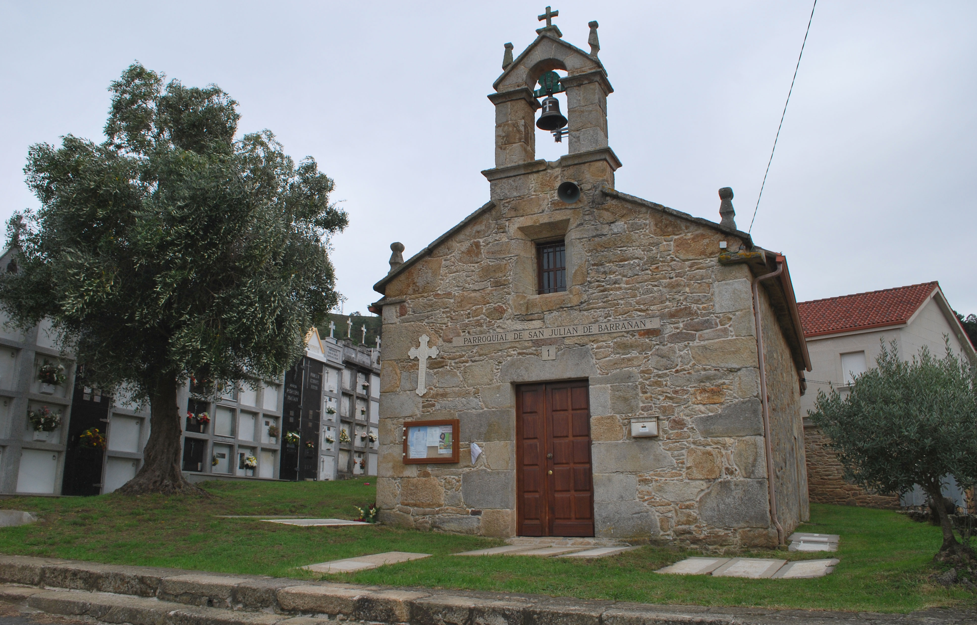 Igrexa de Barrañán século XII Arteixo A Coruña